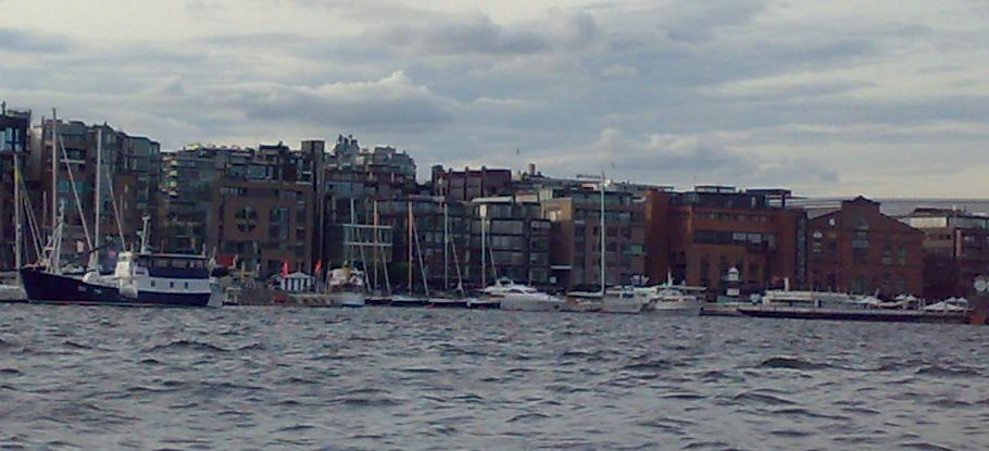 Aker Brygge, Akers Mek Verksted, Oslo, Norway